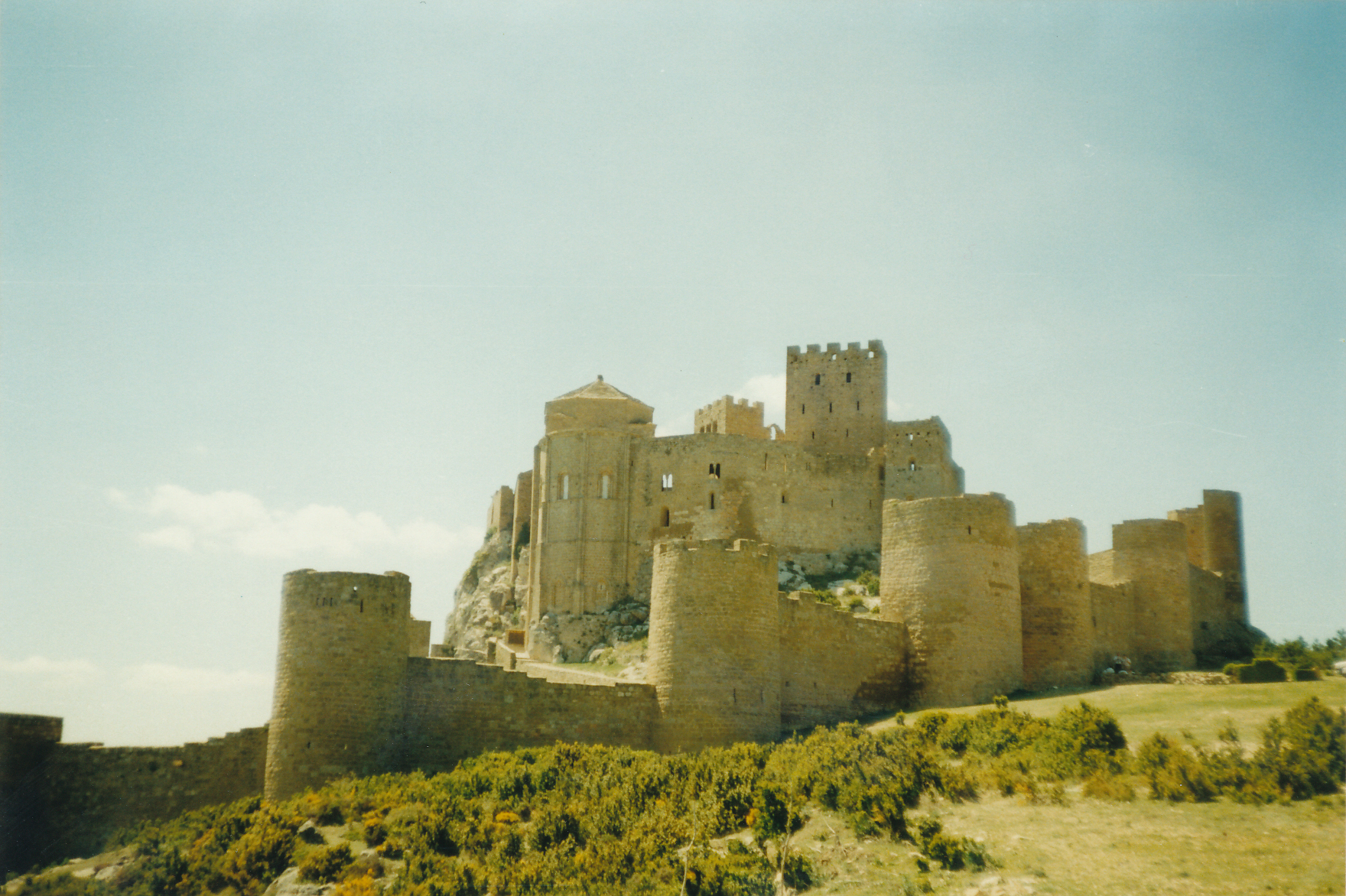 Das mächtige Castillo de Loarre Datum: 06/1989 Urheber: Michael Pfeiffer Quelle: privates Fotoalbum des Urhebers